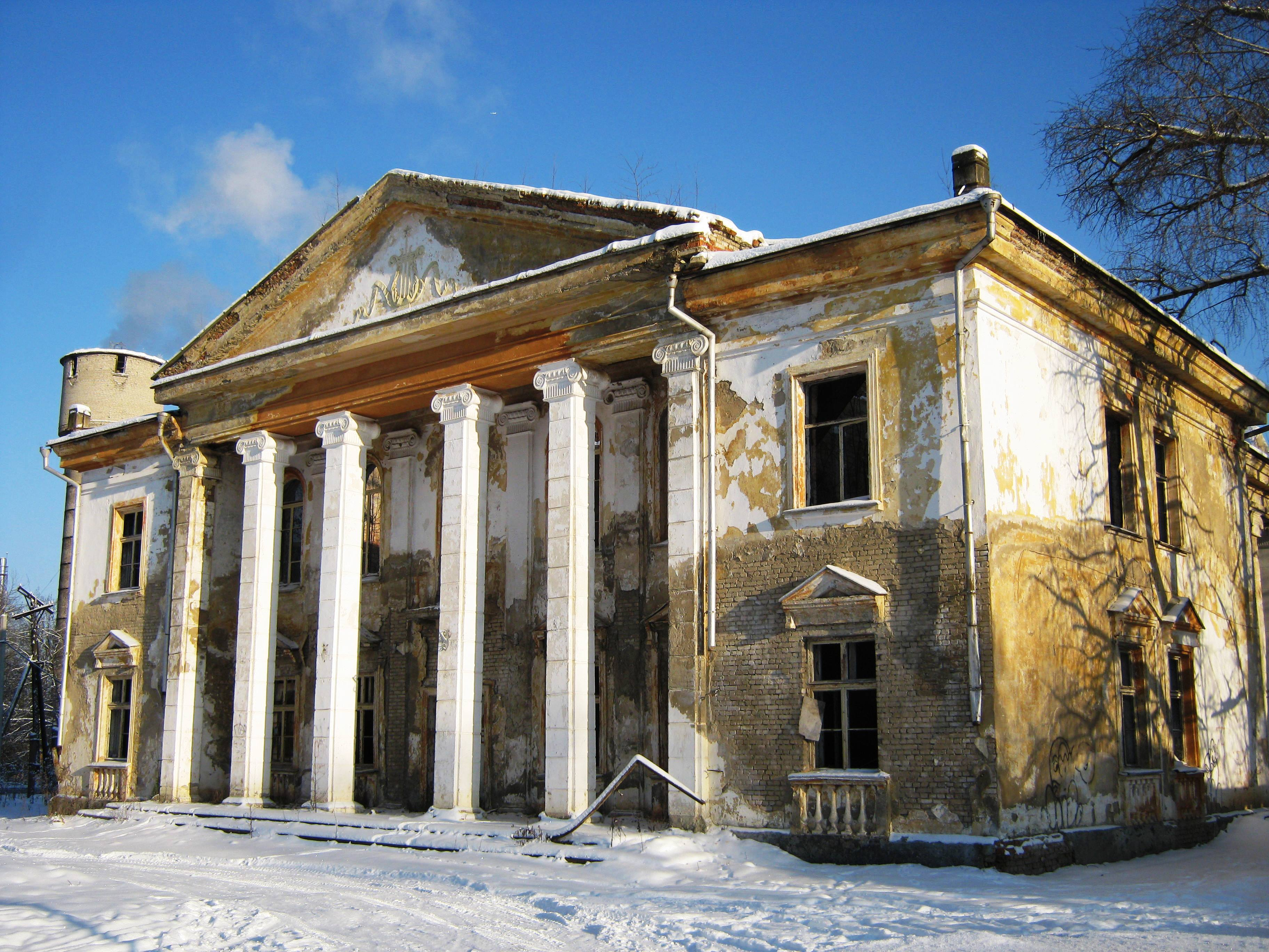 Дом офицеров в Часцах